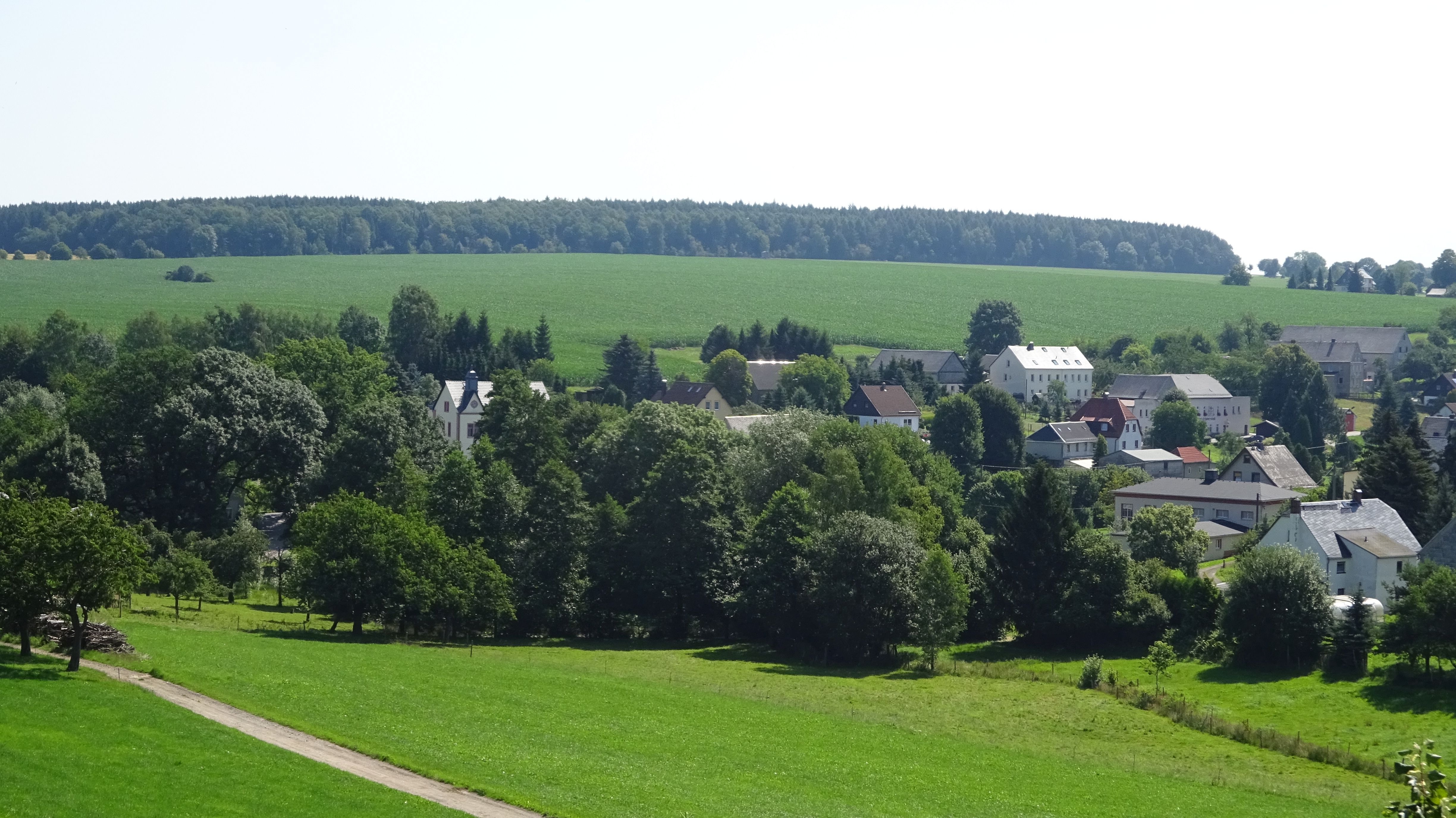 Schönerstadt dorfmitte 2018